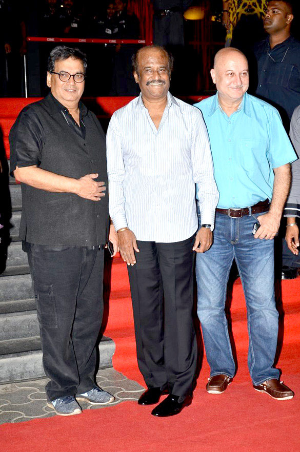 Rajinikanth, Anupam Kher and Subhash Ghai atat Premiere of the film Kochadaiiyaan